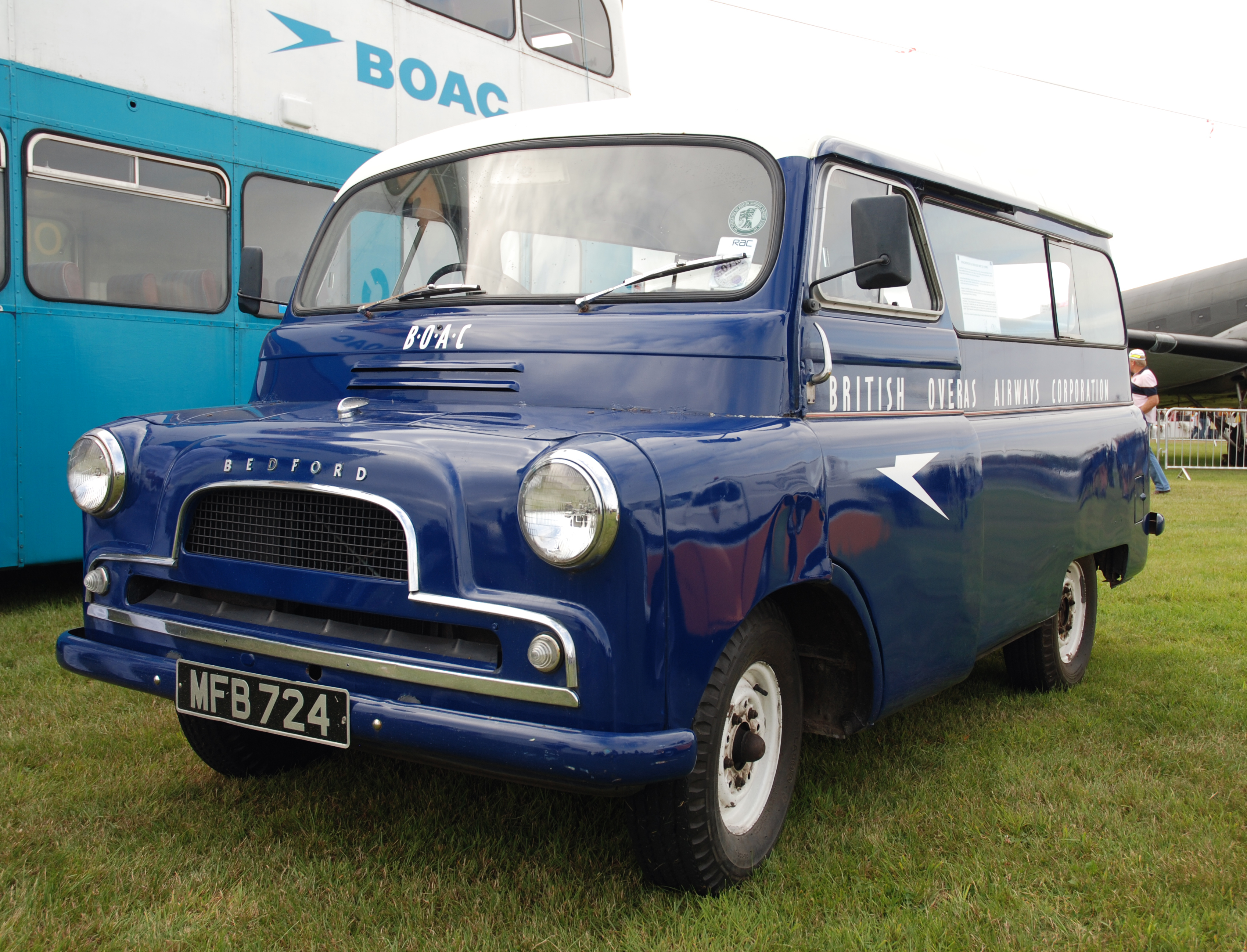 Dunsfold,Aug 2009